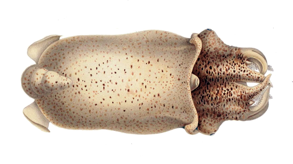 Spirula spirula larva